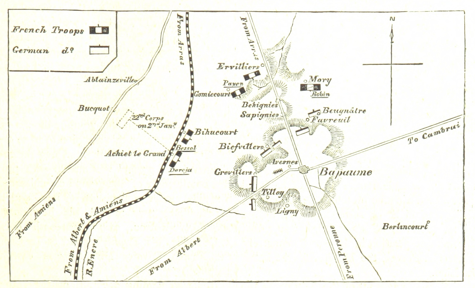 Plan de la bataille de Bapaume (janvier 1871), publié dans "Cassell's History of the War between France and Germany. 1870-1871" par Ollier (Edmund), 1899